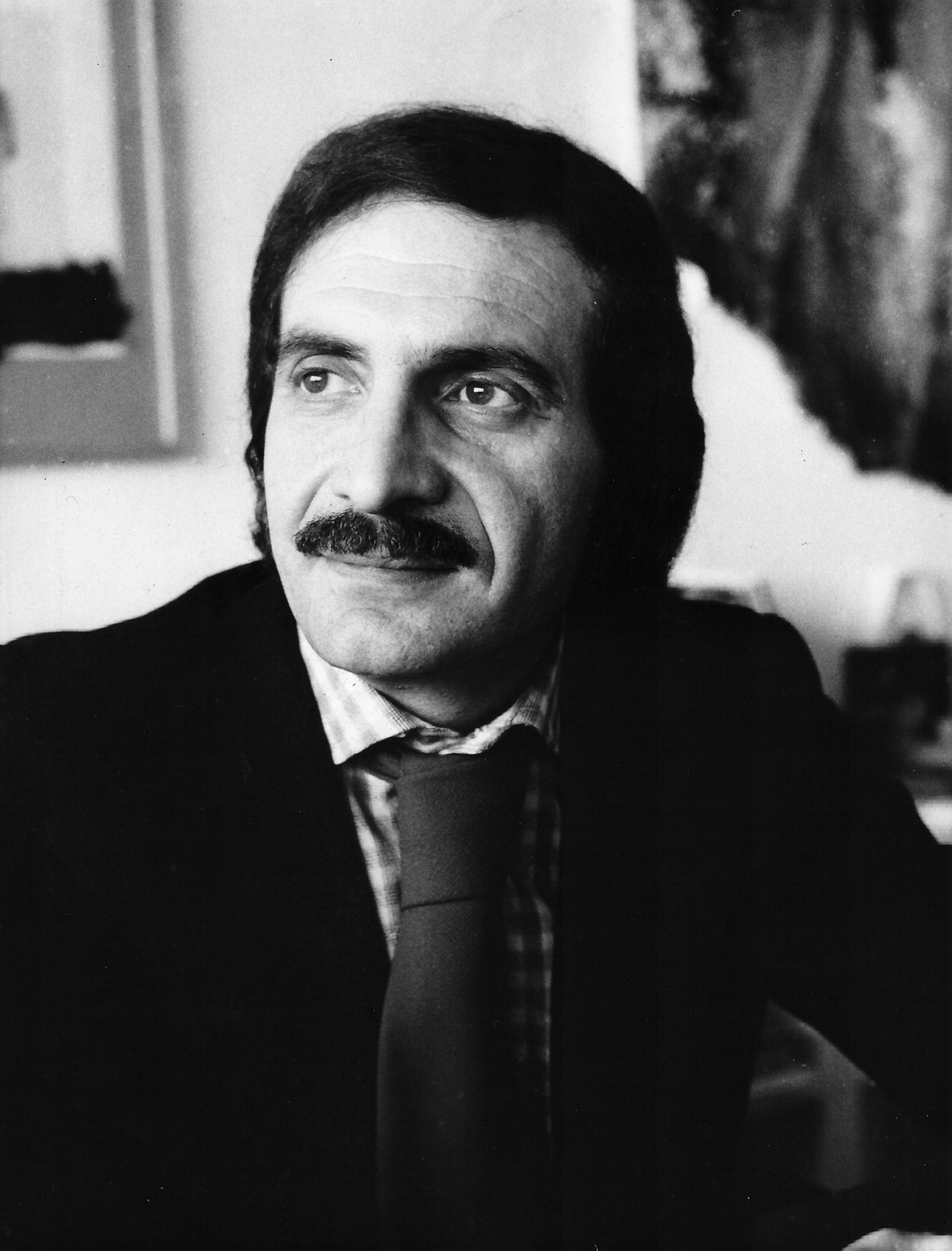 Pino Valenti nel suo studio RAI del CPTV di Napoli